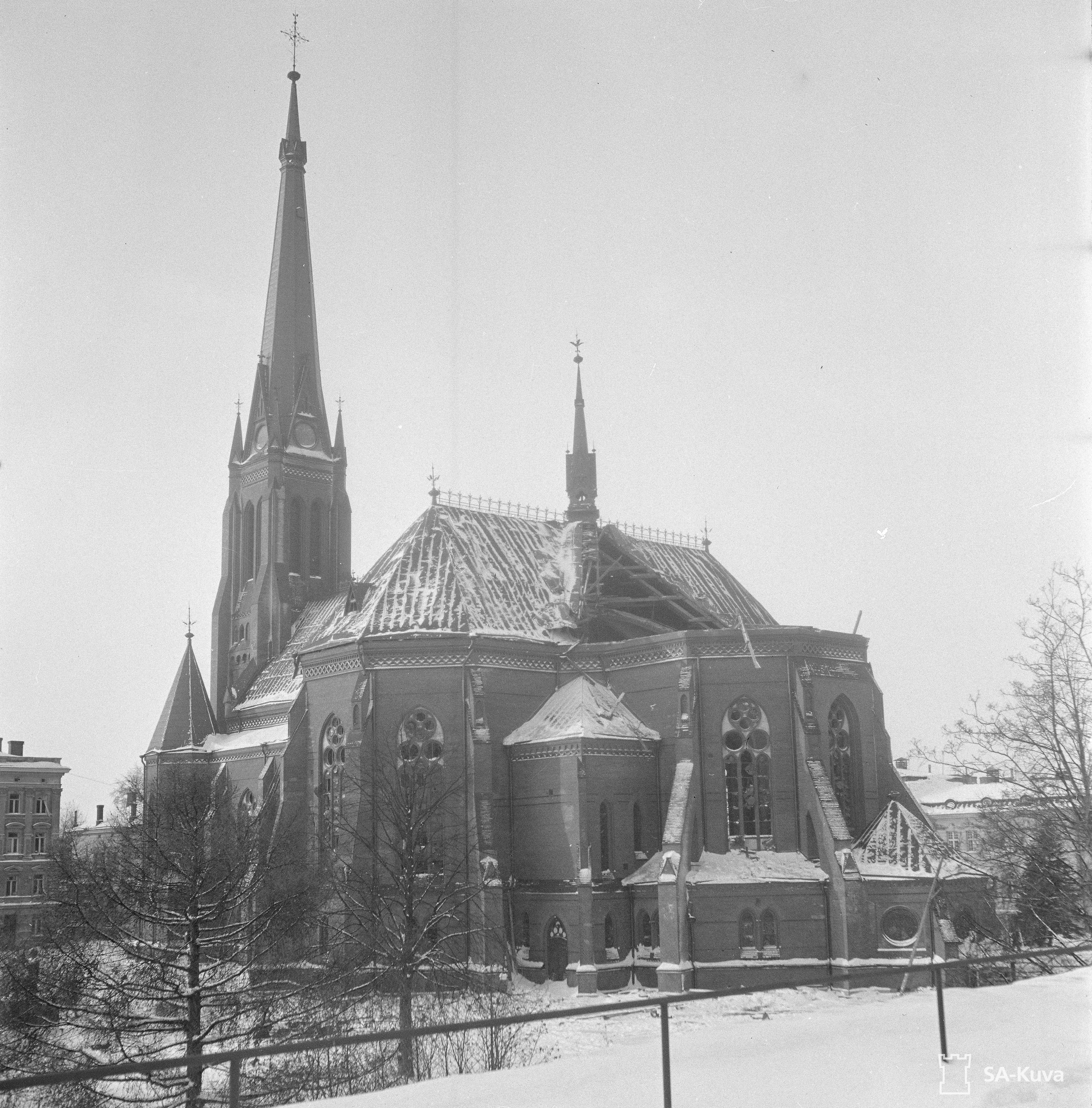 Выборгский кафедральный собор